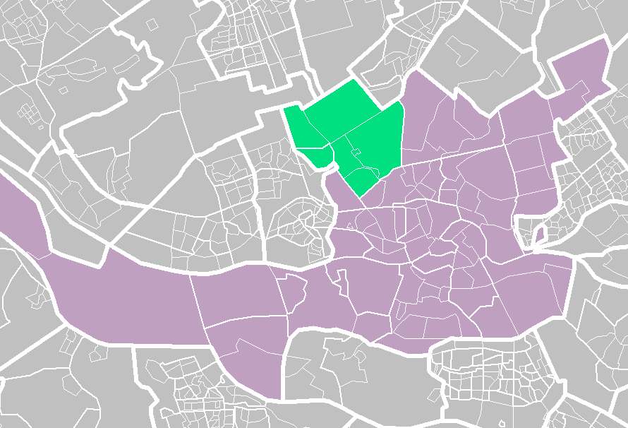 Rotterdam districts/neighboorhoods